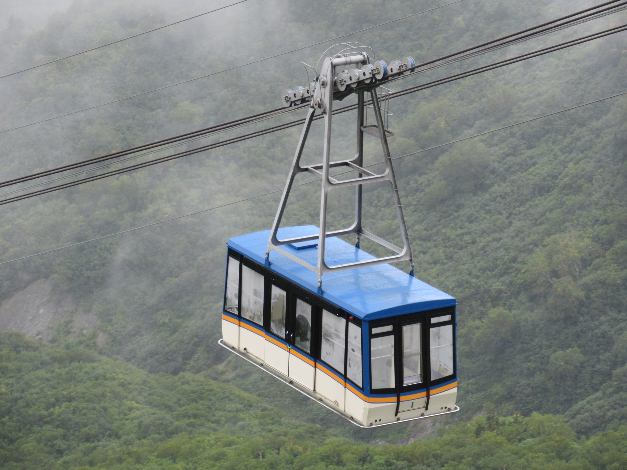 立山ロープウェイの搬器